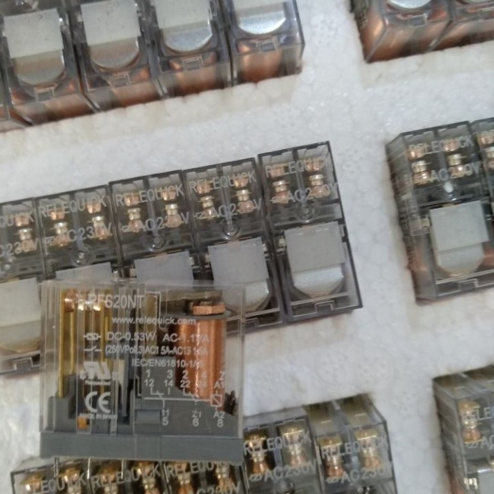 Vista lateral de relé de dos contactos conmutados con caja transparente